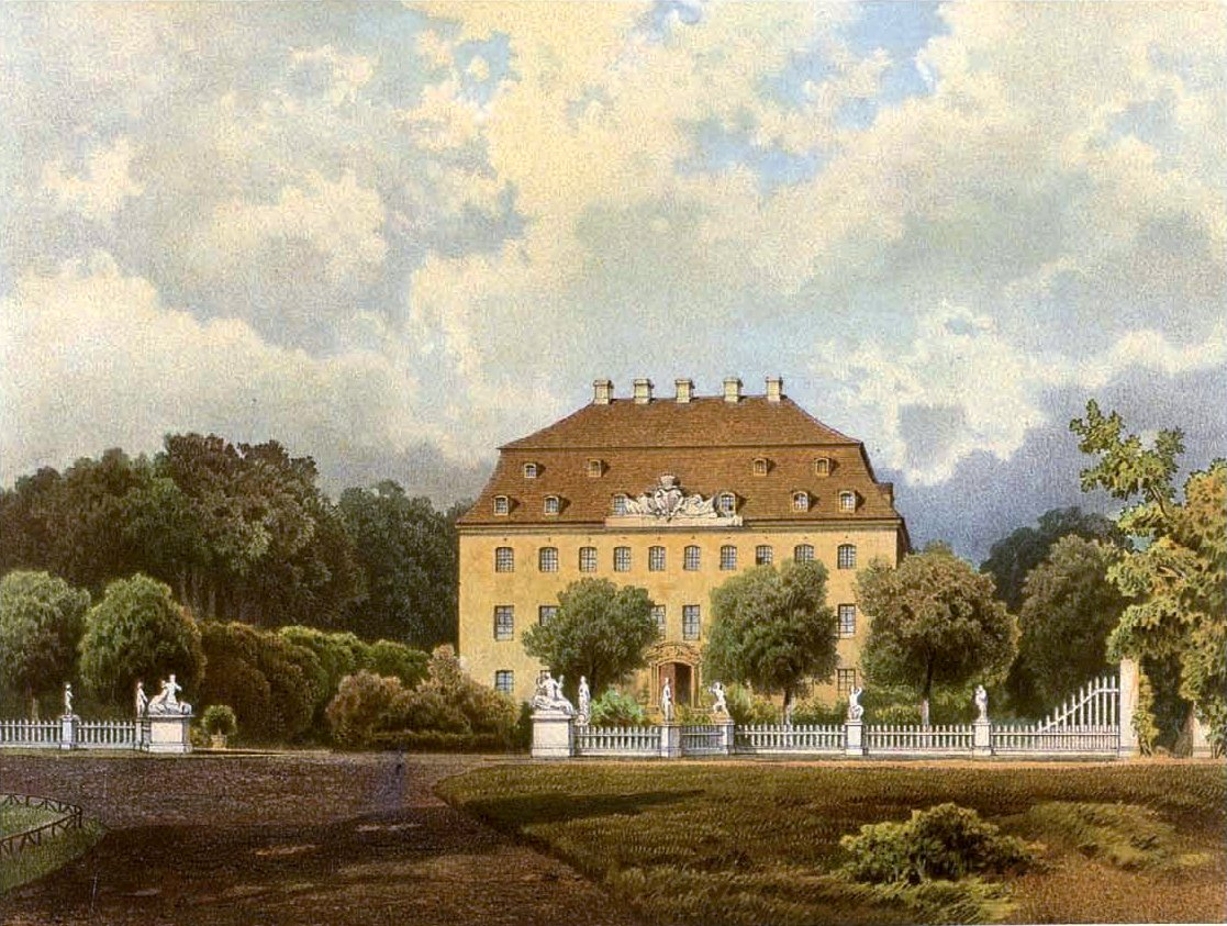 Schloss Altdöbern, Kreis Calau, Provinz Brandenburg